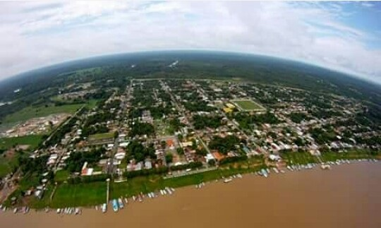 Vista aérea de Urucará (AM)